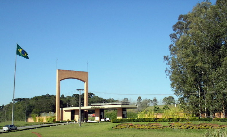 Entrada do Santa Mônica Clube de Campo em Colombo (Grande Curitiba), PR, Sul do Brasil.